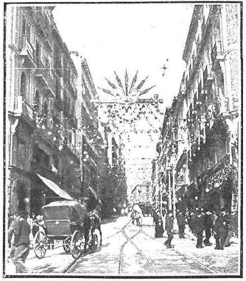 Madrid engalanado, las iluminaciones. La calle del Arenal. La calle del Caballero de Gracia. La calle de la Montera. Fots. Campúa